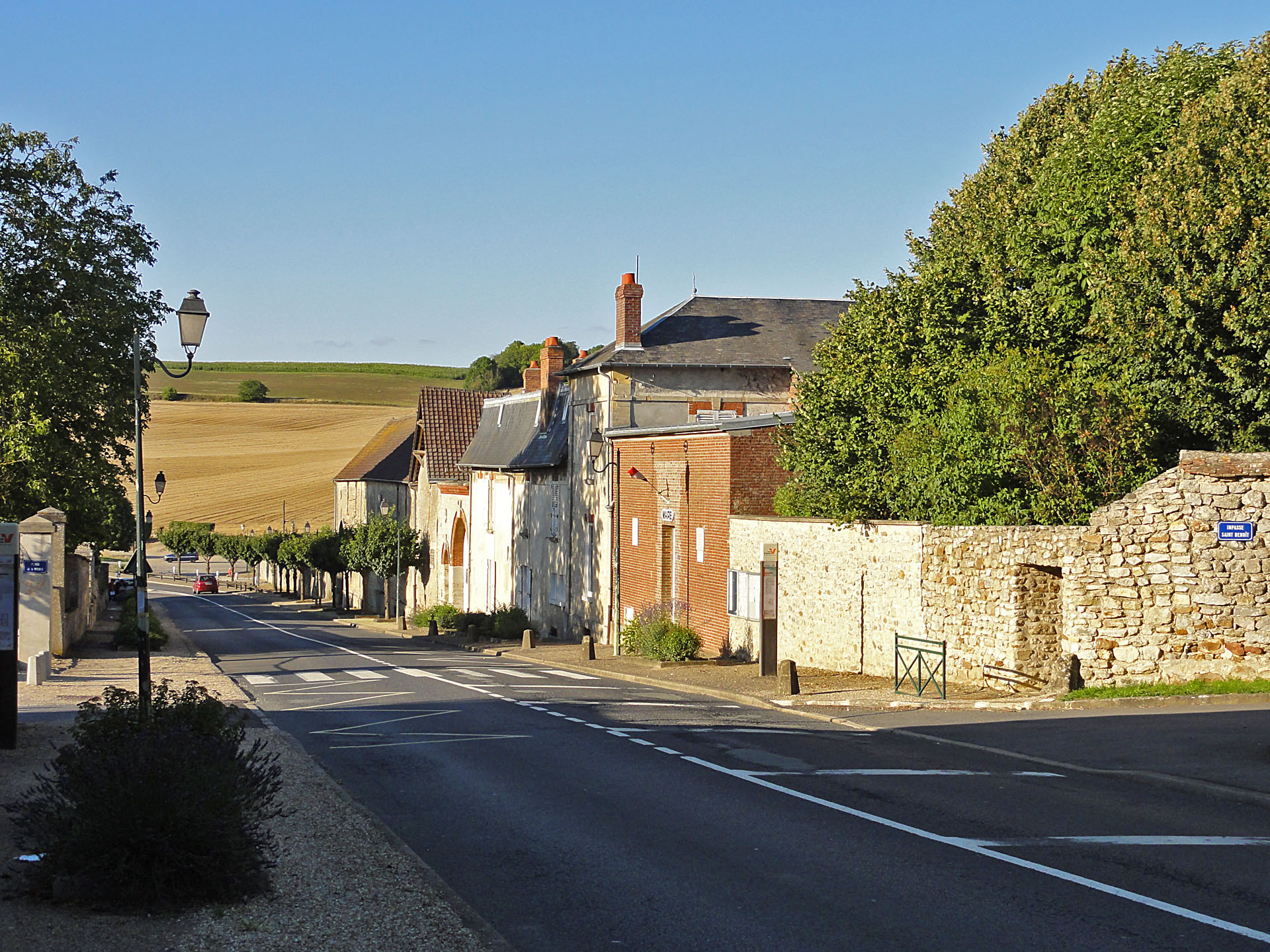 Rue principale du village de Charmont, Val-d'Oise, France.